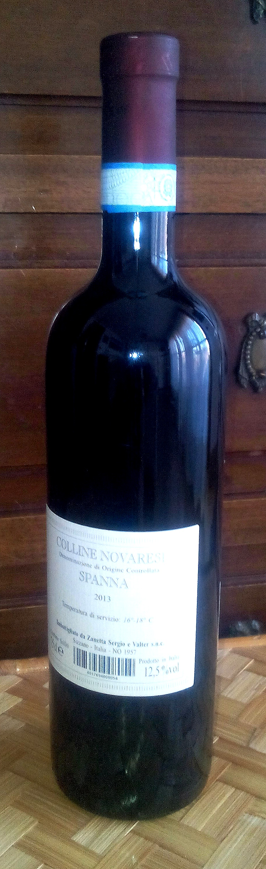 Colline novaresi spanna DOC 2013